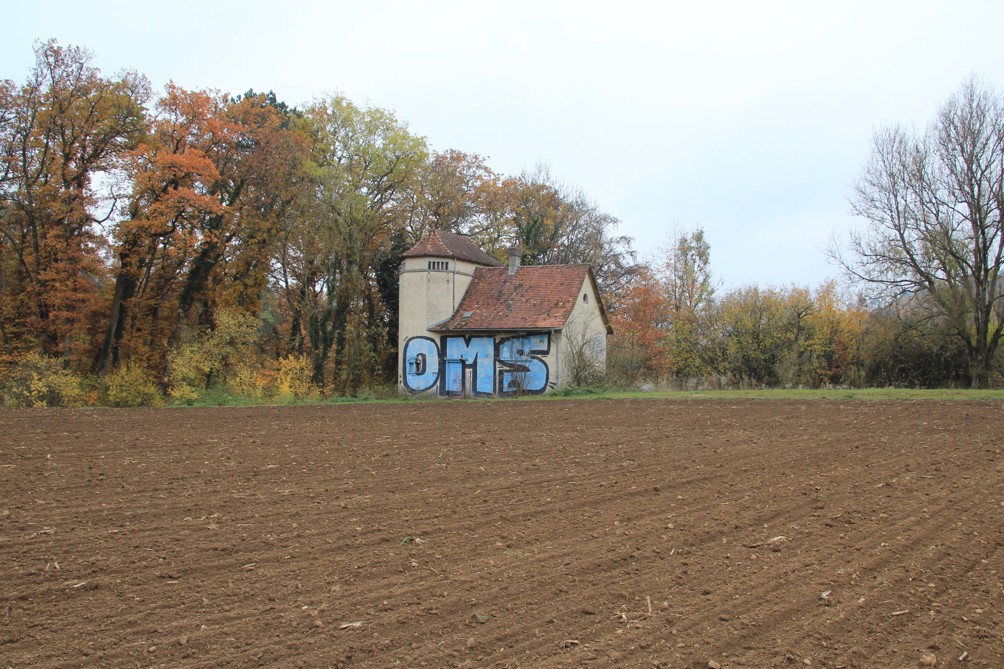 de: Pantli (Siedlung) ehemaliges Transformatorenhaus